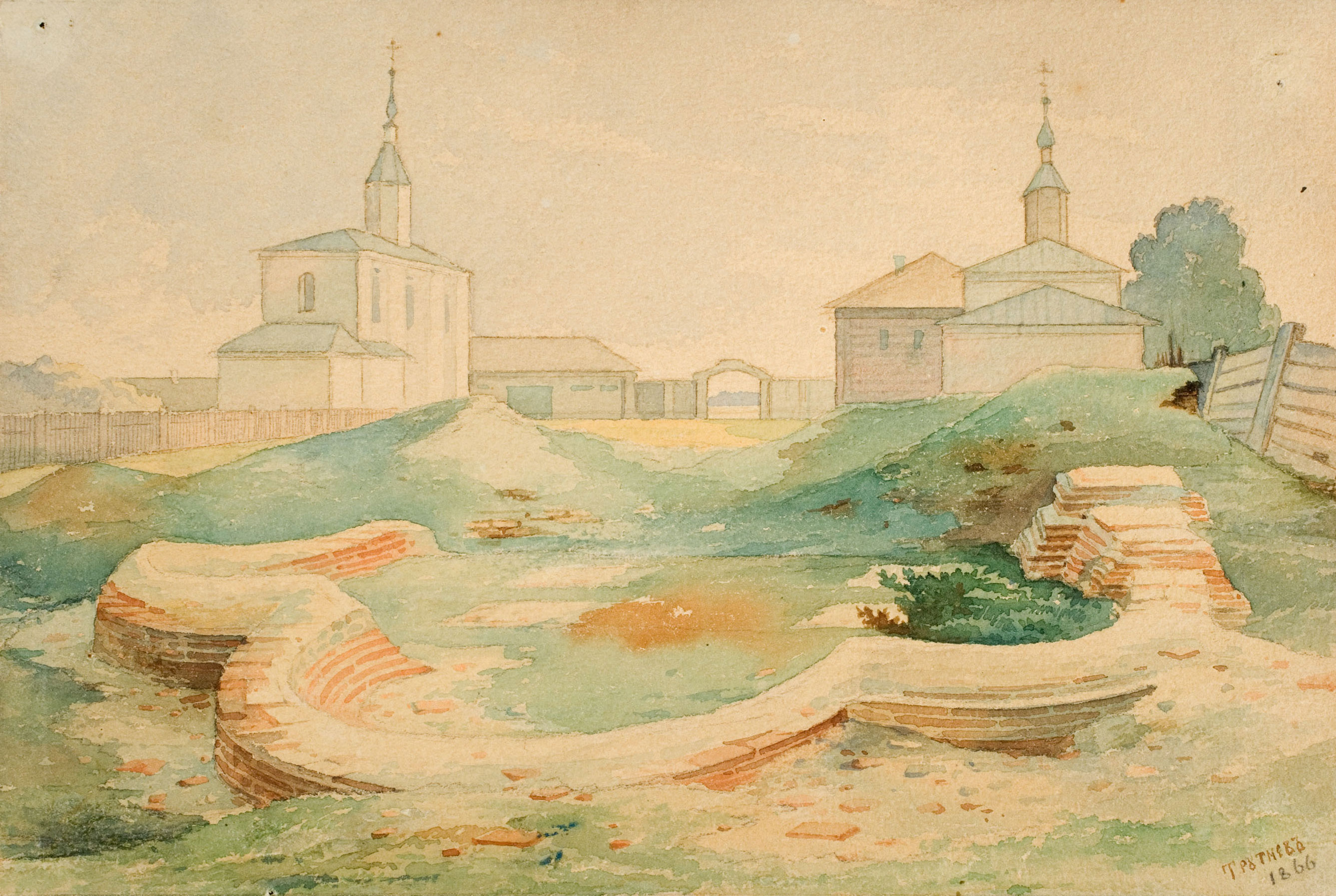 Беларуская (тарашкевіца): Полацак (Połacak), Бельчыца (Bielčyca). Манастыр Сьвятых Барыса і Глеба